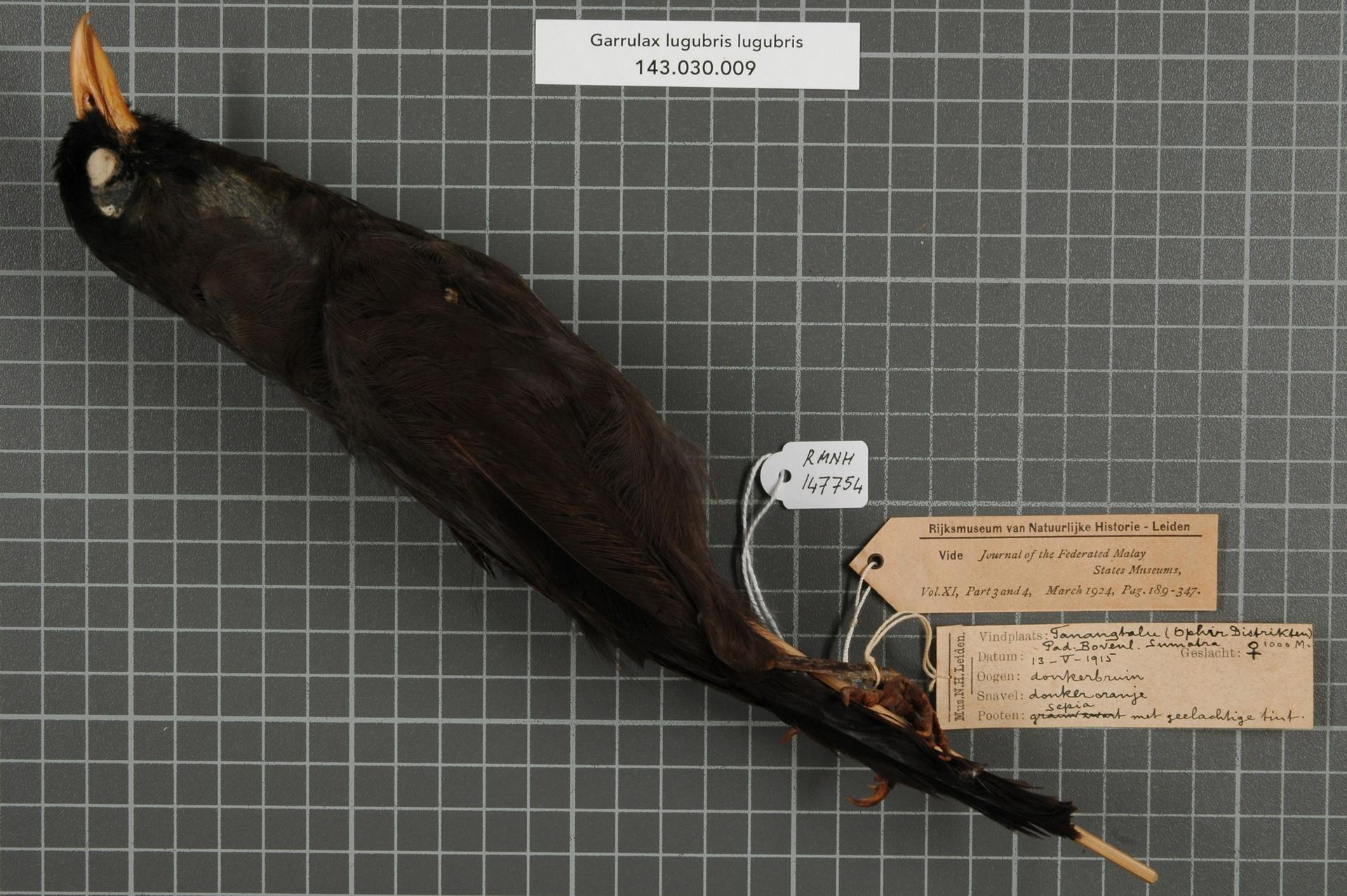 Garrulax lugubris lugubris (Muller, 1835)